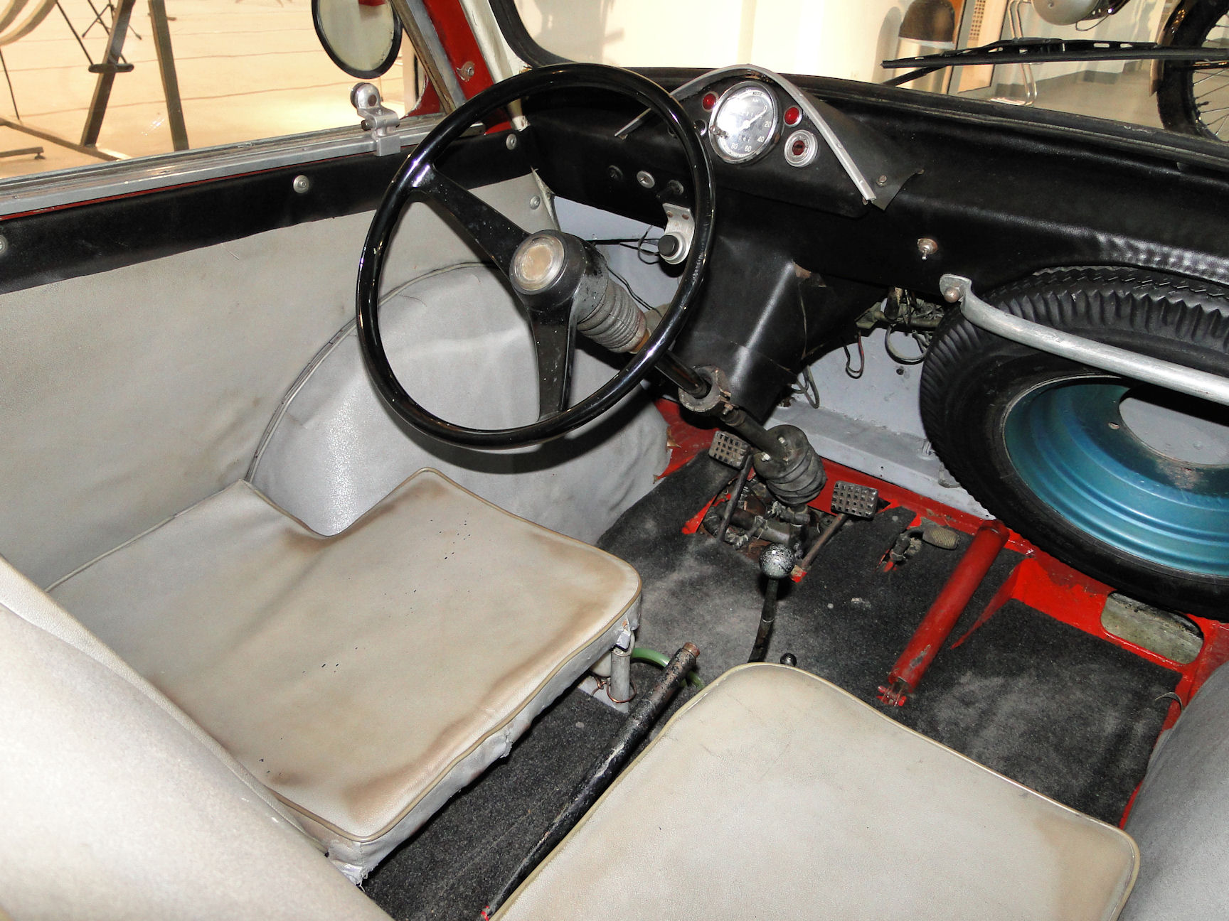 Samochód "Smyk". Eksponowany w Muzeum Techniki i Komunikacji w Szczecinie